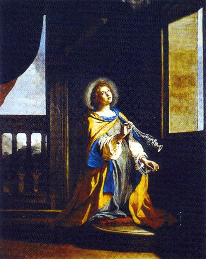 Giovanni Francesco Barbieri, soprannominato il Guercino, Raffigurazione di Santa Palazia, 1658 circa.